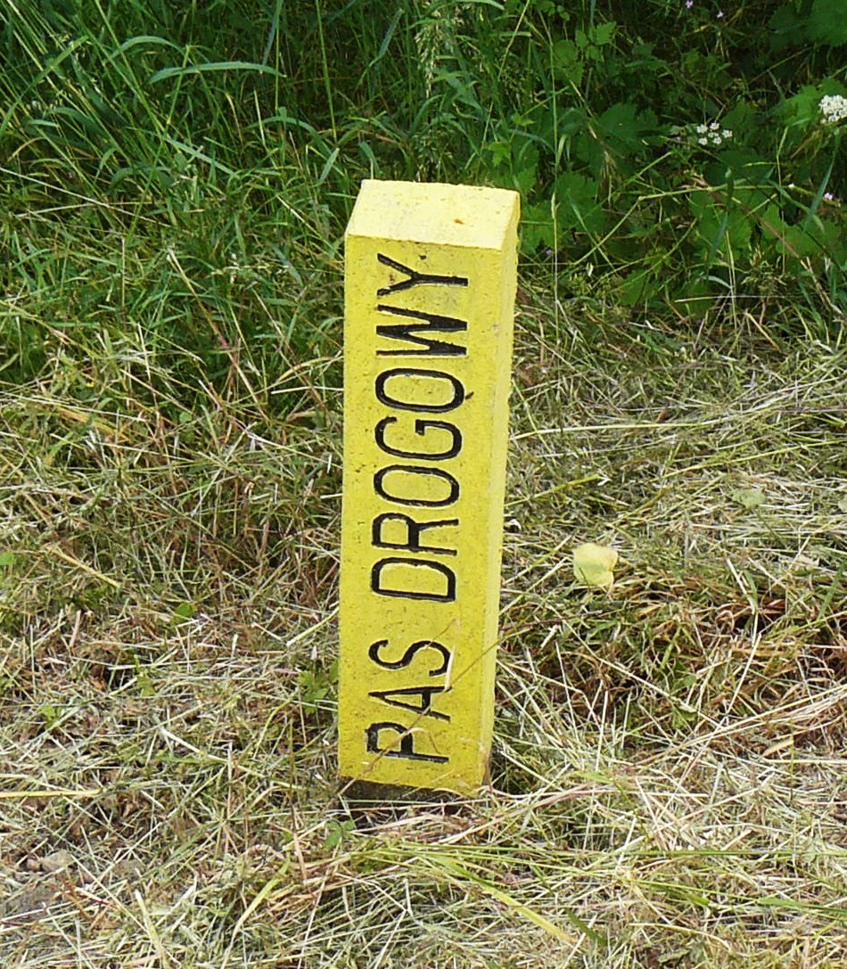 Droga krajowa nr 22 w Starym Osiecznie.